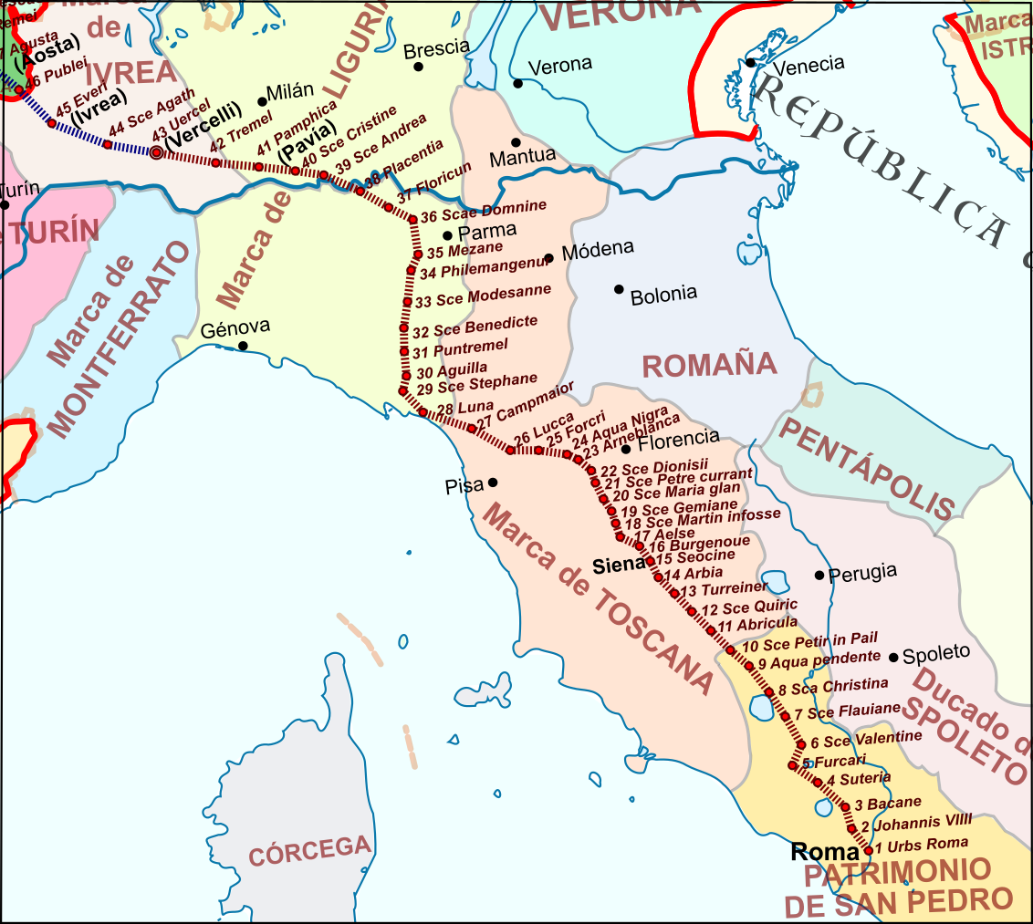 Recorrido del itinerario de Sigerico en el reino de Italia